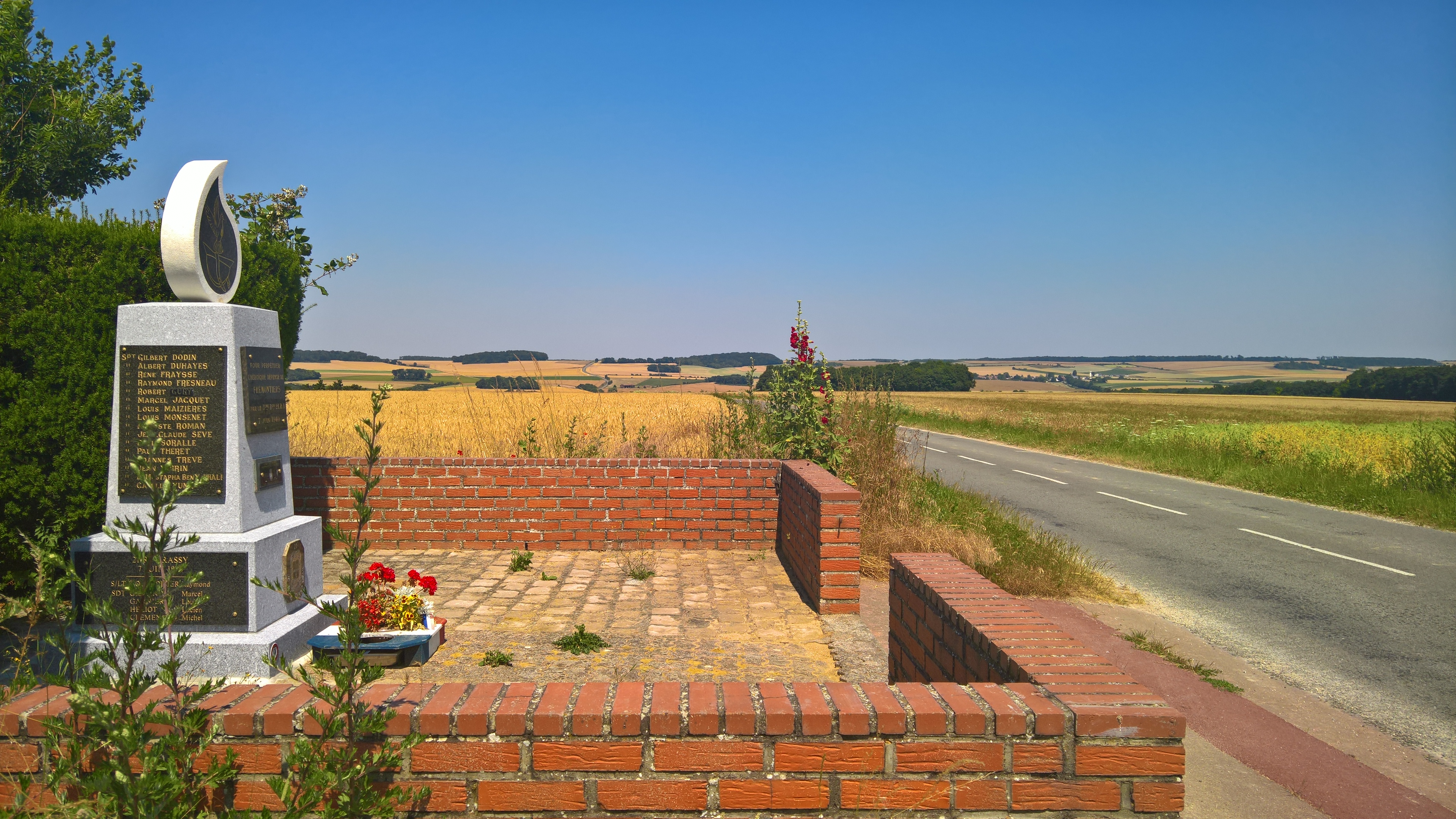 Stèle commémorative du combat de Frémontiers le 7 juin 1940 et paysage du vallon